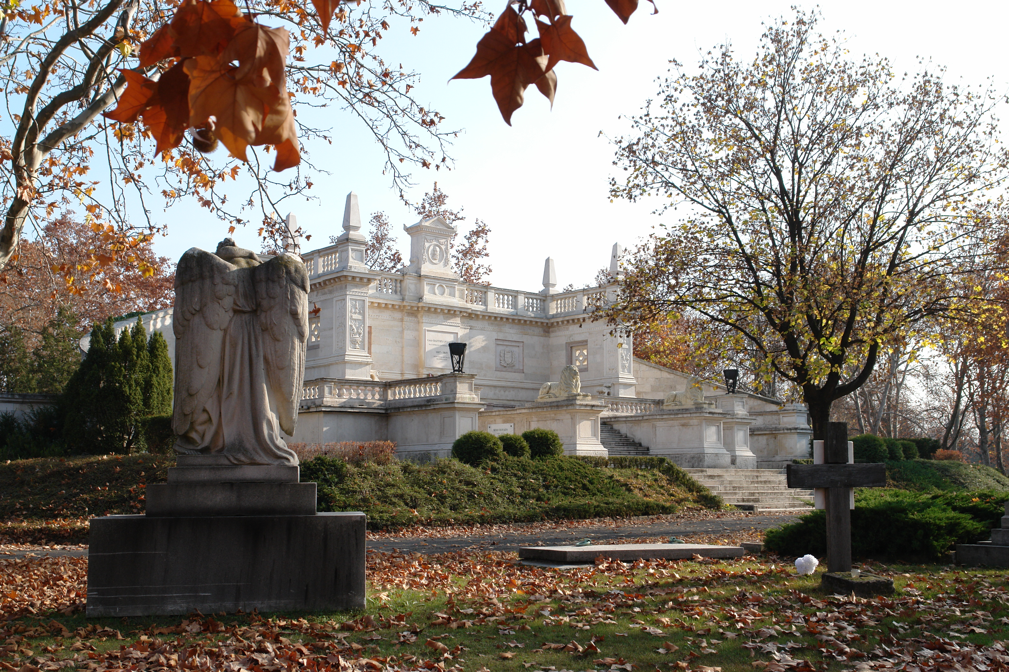 a temető egész területe az állami tulajdonú védett síremlékekkel együtt This is a photo of a monument in Hungary. Identifier: 90002